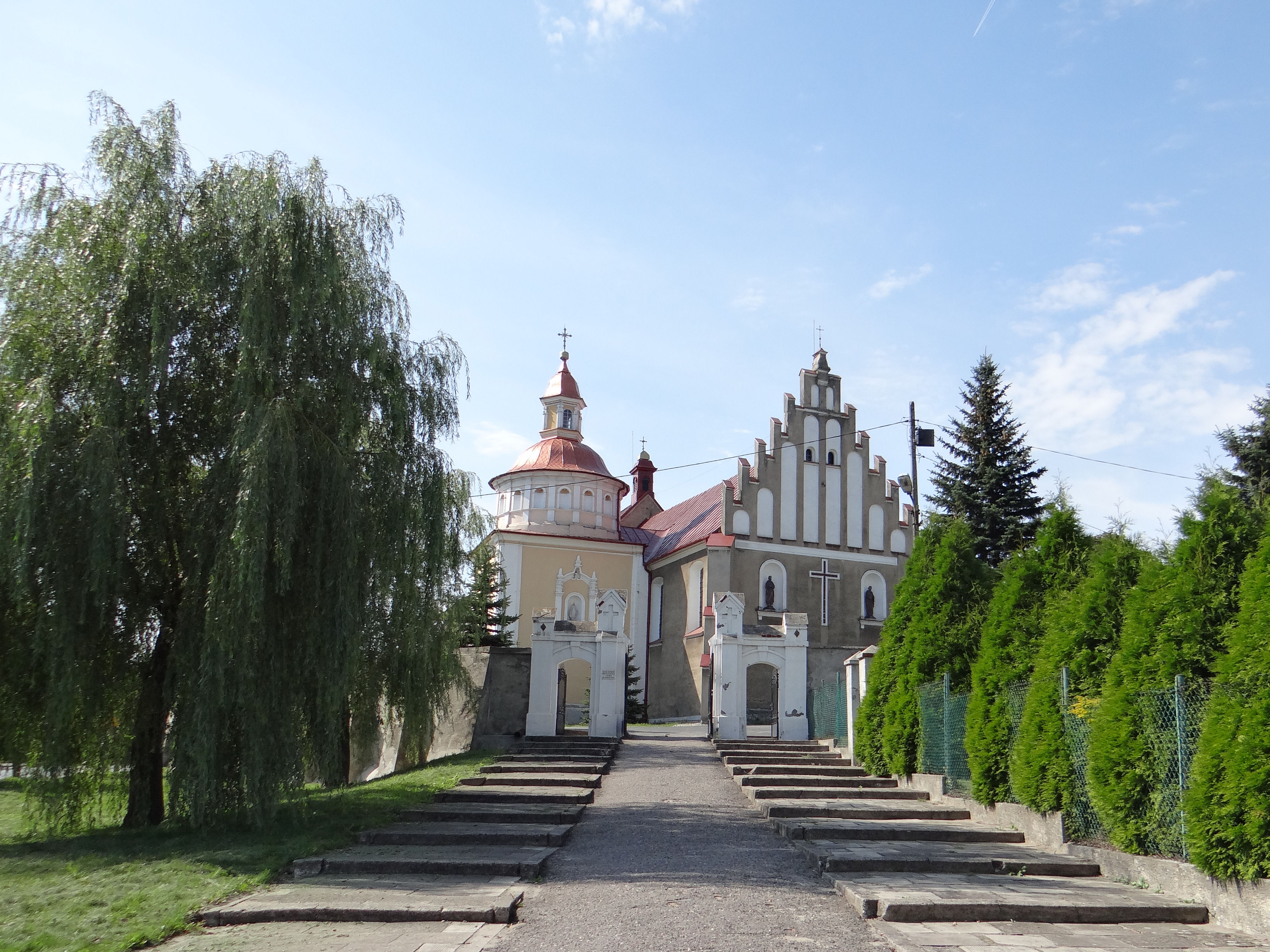 Kościół p.w. Podwyższenia Świętego Krzyża w Brzezinach - wjazd od strony ul Chopina